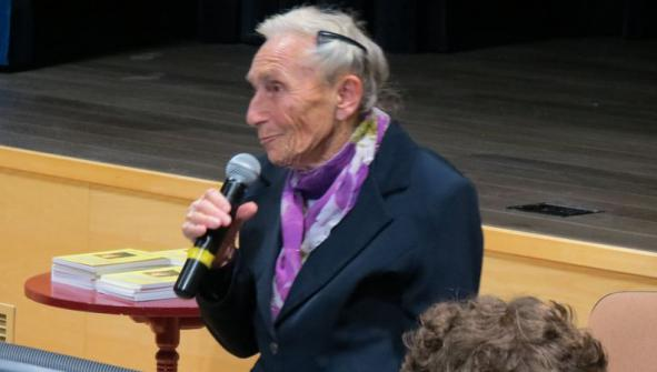 Stella Zylbersztajn-Tzur podczas podczas wizyty w Łosicach w 2015 roku